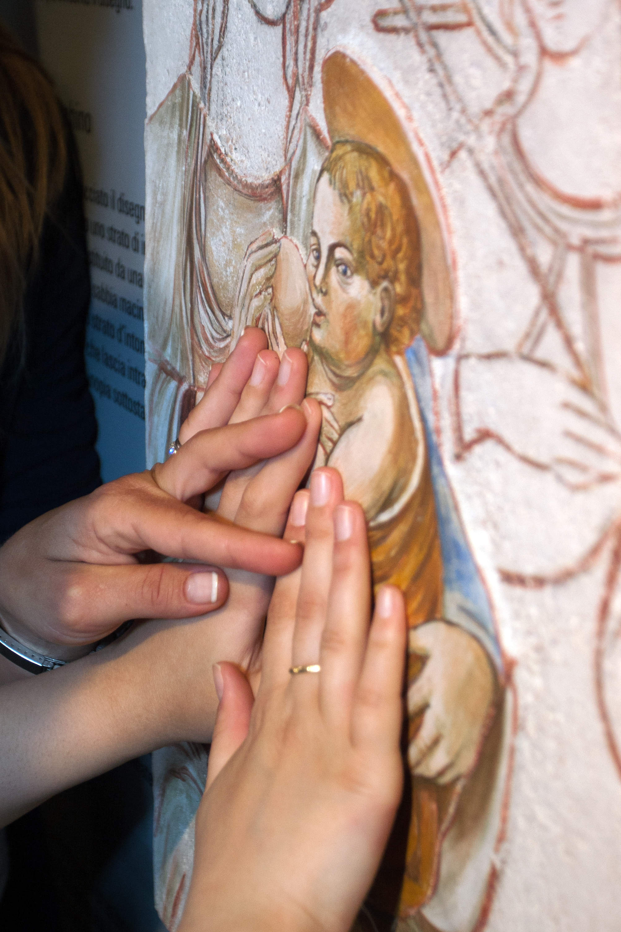 Particolare del percorso tattile sulla tecnica dell'affresco - Foto del Gruppo Fotografico Giglio Rosso di Castelfiorentino